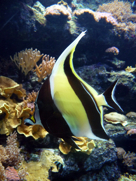 Zanclus cornutus